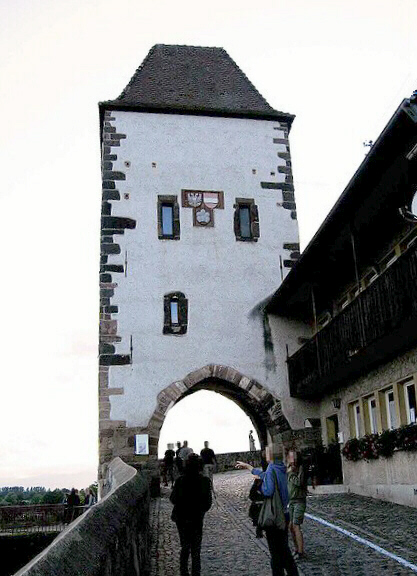 Hagenbachturm in Breisach am Rhein, Deutschland.